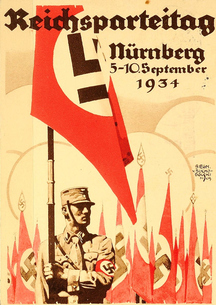 Siegmund von Suchodolski - Reichsparteitag in Nürnberg, 5.-10. September 1934